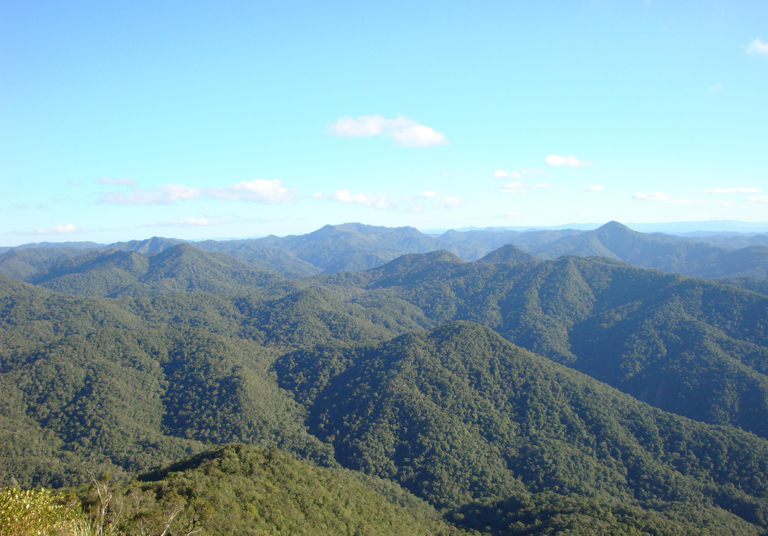 Morro Spitzkopf - Vista para o Parque Nacional da Serra do Itajaí